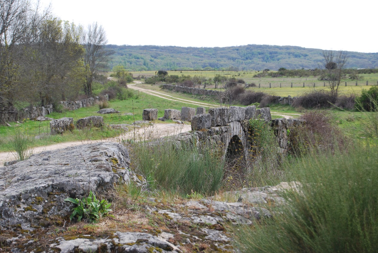 Estremeñu: La puente romana